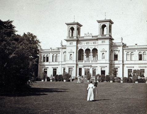 Deutschland, Bonn: Villa Hammerschmidt nach erfolgtem Umbau; um 1900 (aktuelle Nutzung: zweiter Amtssitz des deutschen Bundespräsidenten).